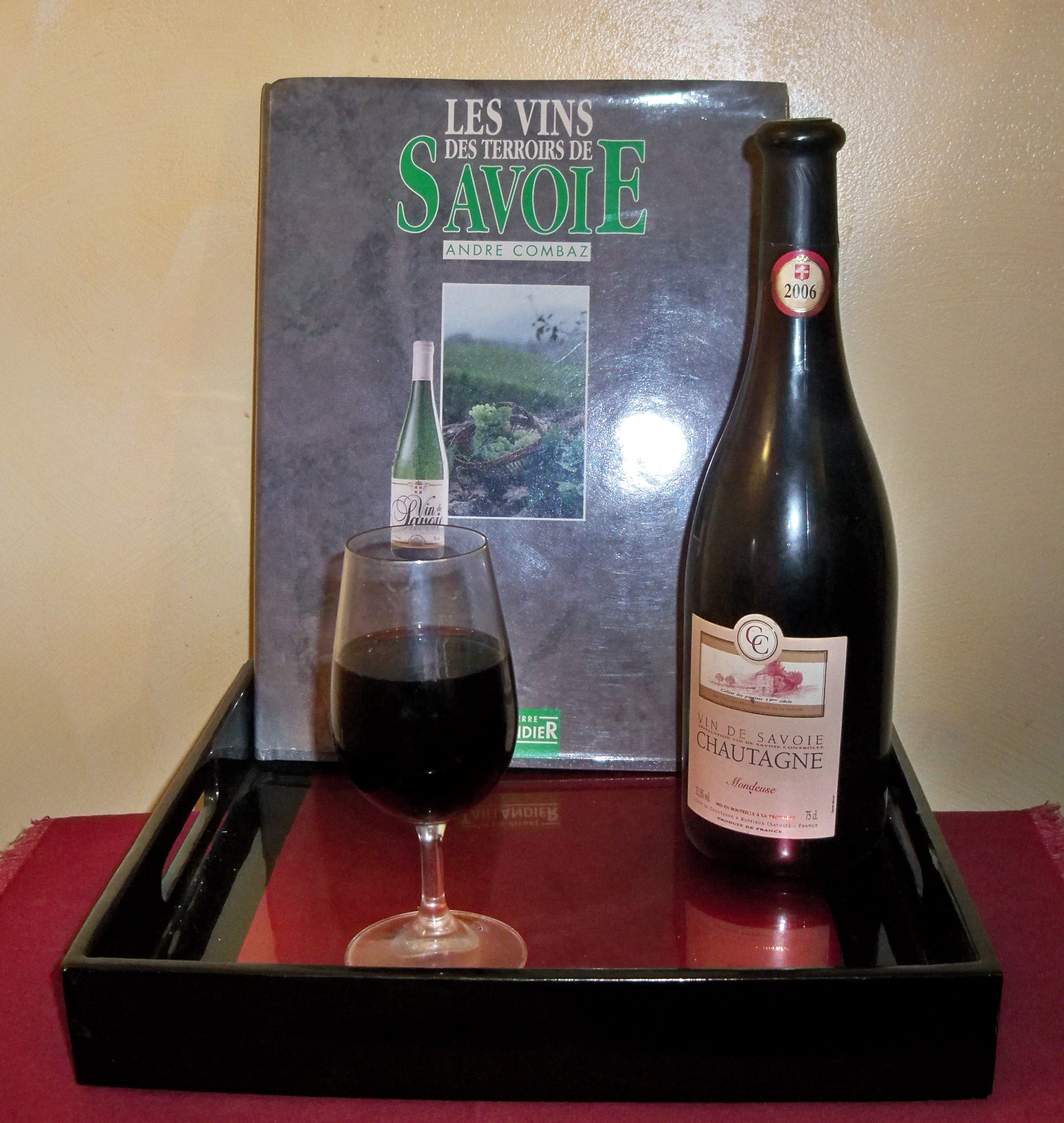 bouteille de Chautagne, Savoie, France